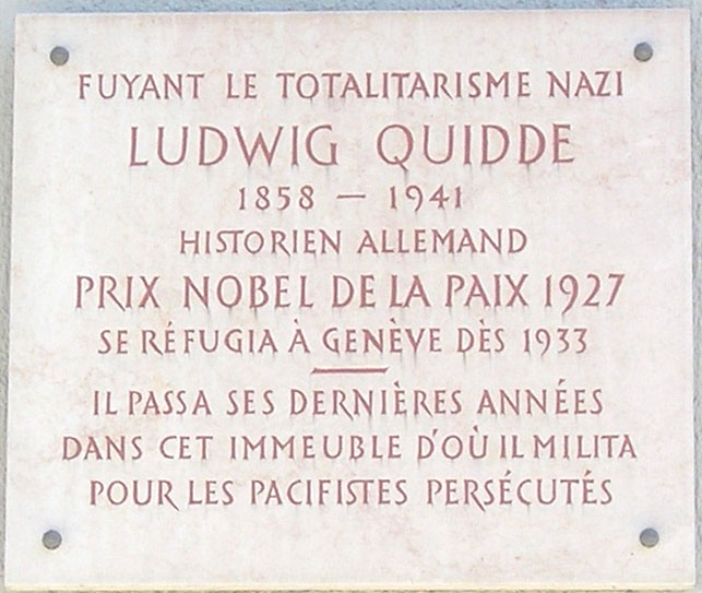 Plaque en mémoire de Ludwig Quidde, à l'avenue Blanc à Genève